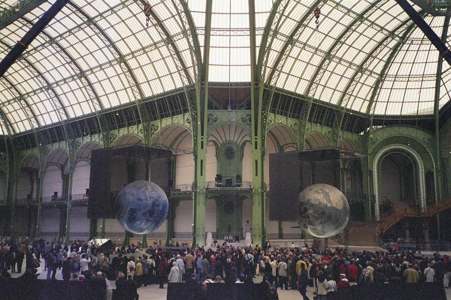 Grand Palais, Paris, France